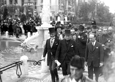 Inaugurazione della fontana-giardino di Piazza Mazzini (1926). In primo piano da sinistra verso destra: Filippo Cremonesi; Benito Mussolini, e l'architetto Raffaele De Vico, autore del progetto della piazza stessa.